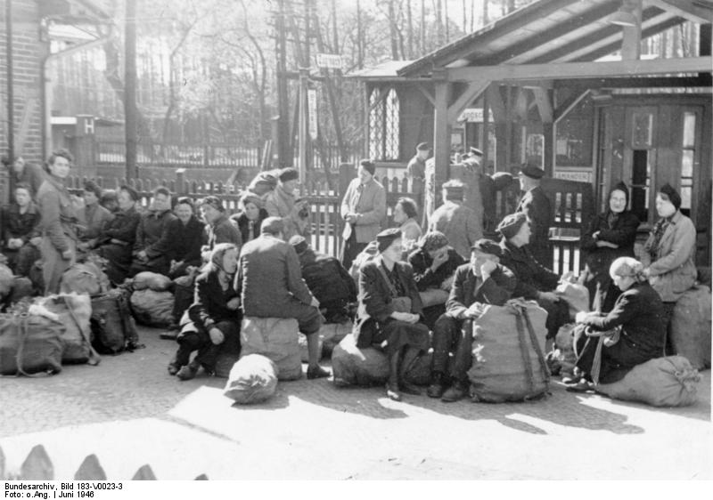 bei Berlin, Warten auf den Zug Zentralbild/SNB Im Juni 1946. An der Eisenbahnstrecke Berlin-Rosenow, Deutsche fahren nach Lebensmittel. 5050-50 [Bahnhof Fangschleuse, südöstlich von Berlin, auf ihren Rücksäcken und Bündeln sitzend, warten die Großstädter auf die Abfahrt des Zuges.]